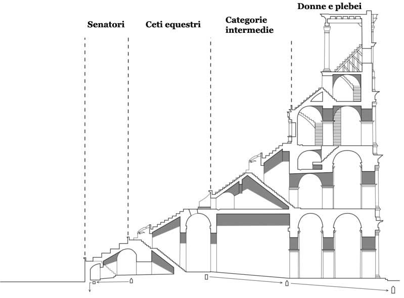 Profilo trasversale del Colosseo a Roma. from: Image:Colosseum-profile-plain.png